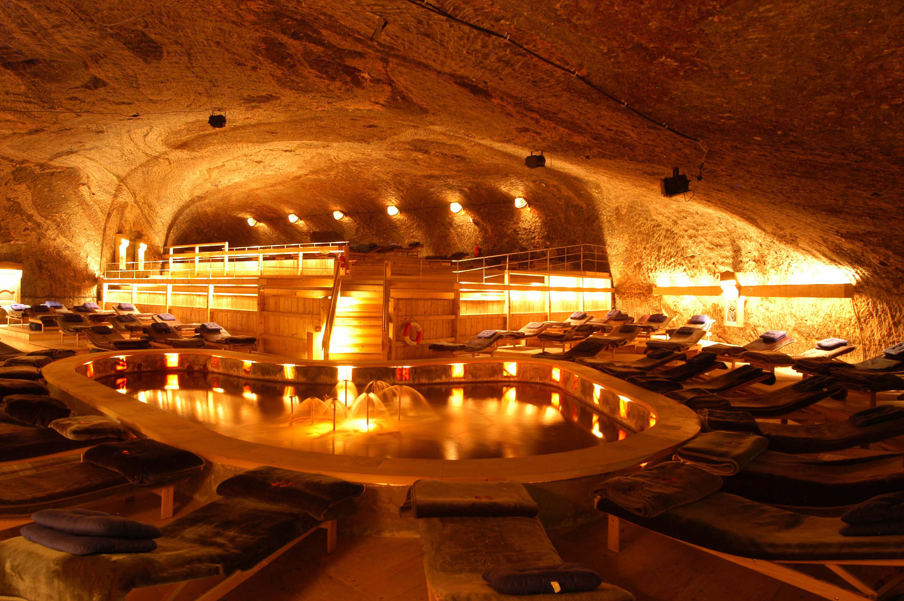 Der Salzheilstollen Berchtesgaden